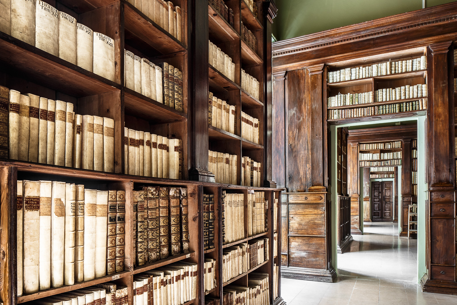 Palazzo Gambalunga (Biblioteca Civica) - Sale seicentesche This is a photo of a monument which is part of cultural heritage of Italy.